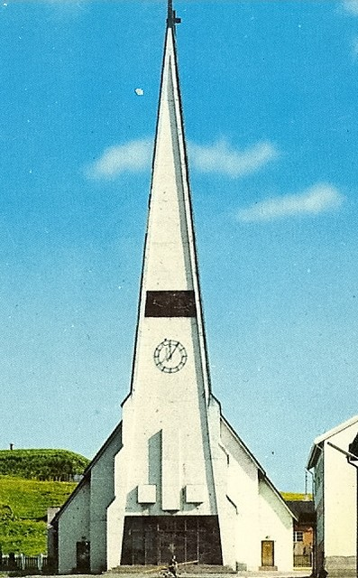 Vardø kirke